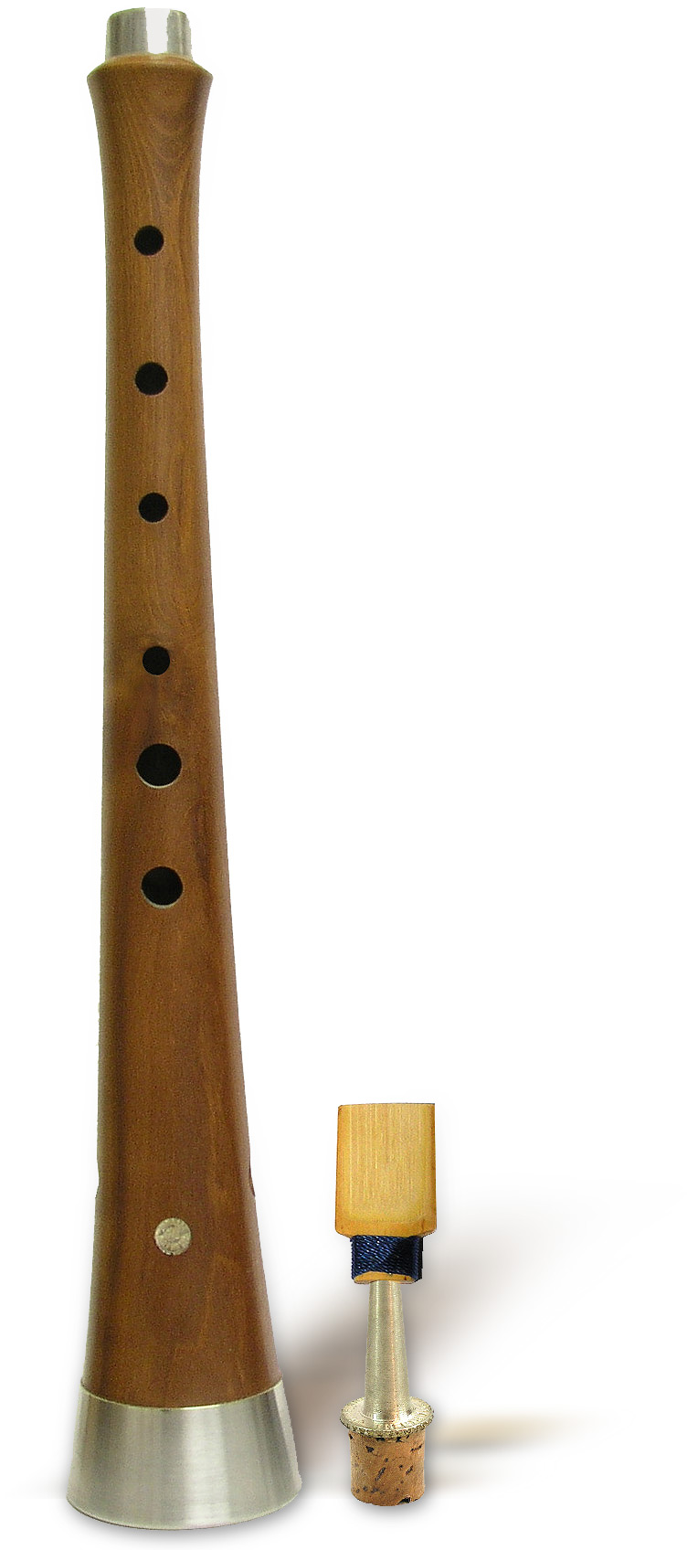 Gralla seca construida per el Luthier de gralles , tarotes dolçaines i tabals Josep Bonamusa